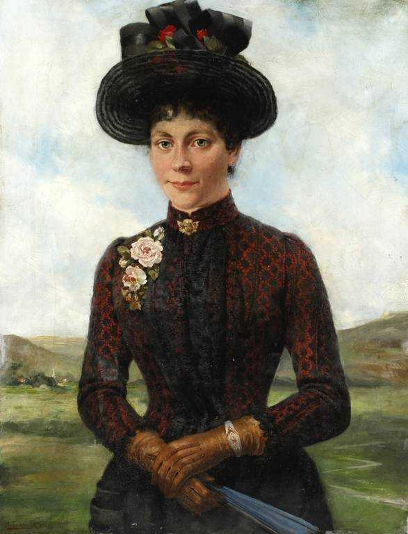 Damenportrait